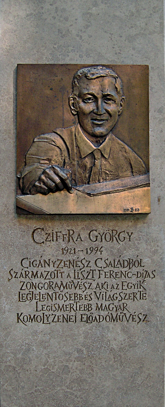 Cziffra György domborműve, készítette Illyés Antal; Muzsikus cigányok parkja, Budapest, VIII.